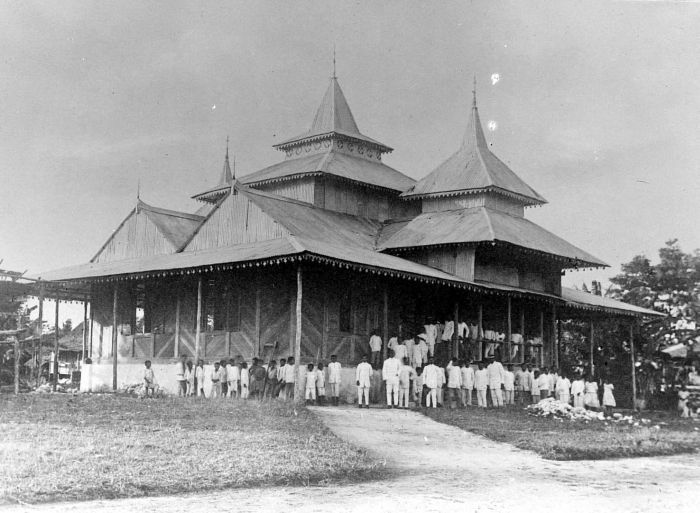 Repronegatief. Kerk te Karotung, Taland, Sulawesi.